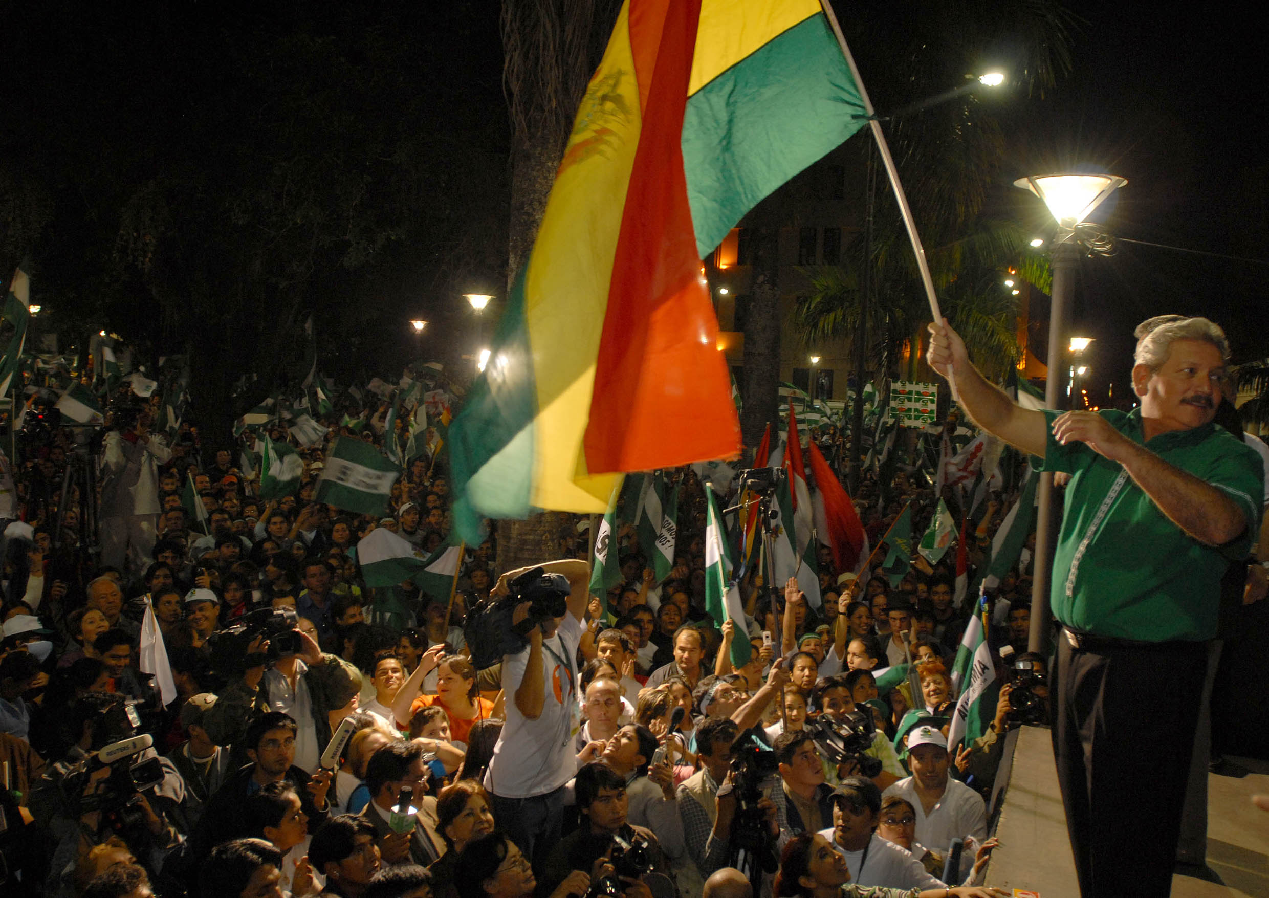 A população de Santa Cruz comemora na Praça 24 de Setembro o início da apuração que indica a vitória nas urnas da proposta de autonomia do Departamento (Estado)